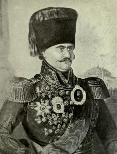 Miloš Obrenović I, príncipe de Serbia.